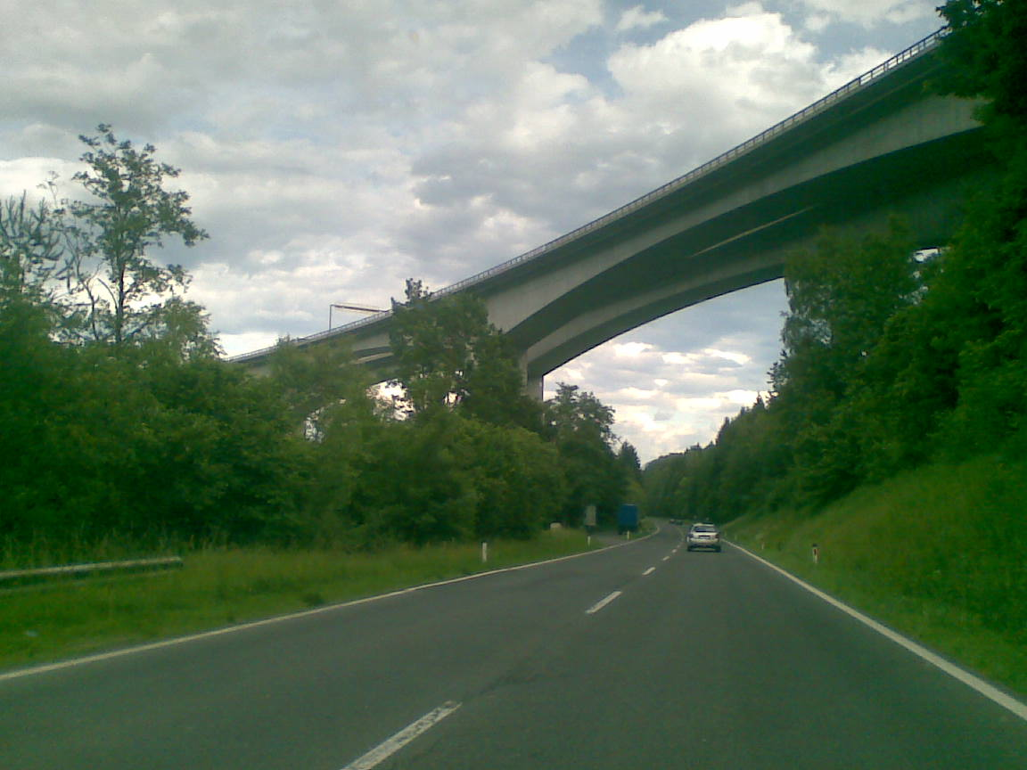 B100 nördlich von Villach, Gemeinde Weißenstein, Bezirk Villach Land, Kärnten, Österreich